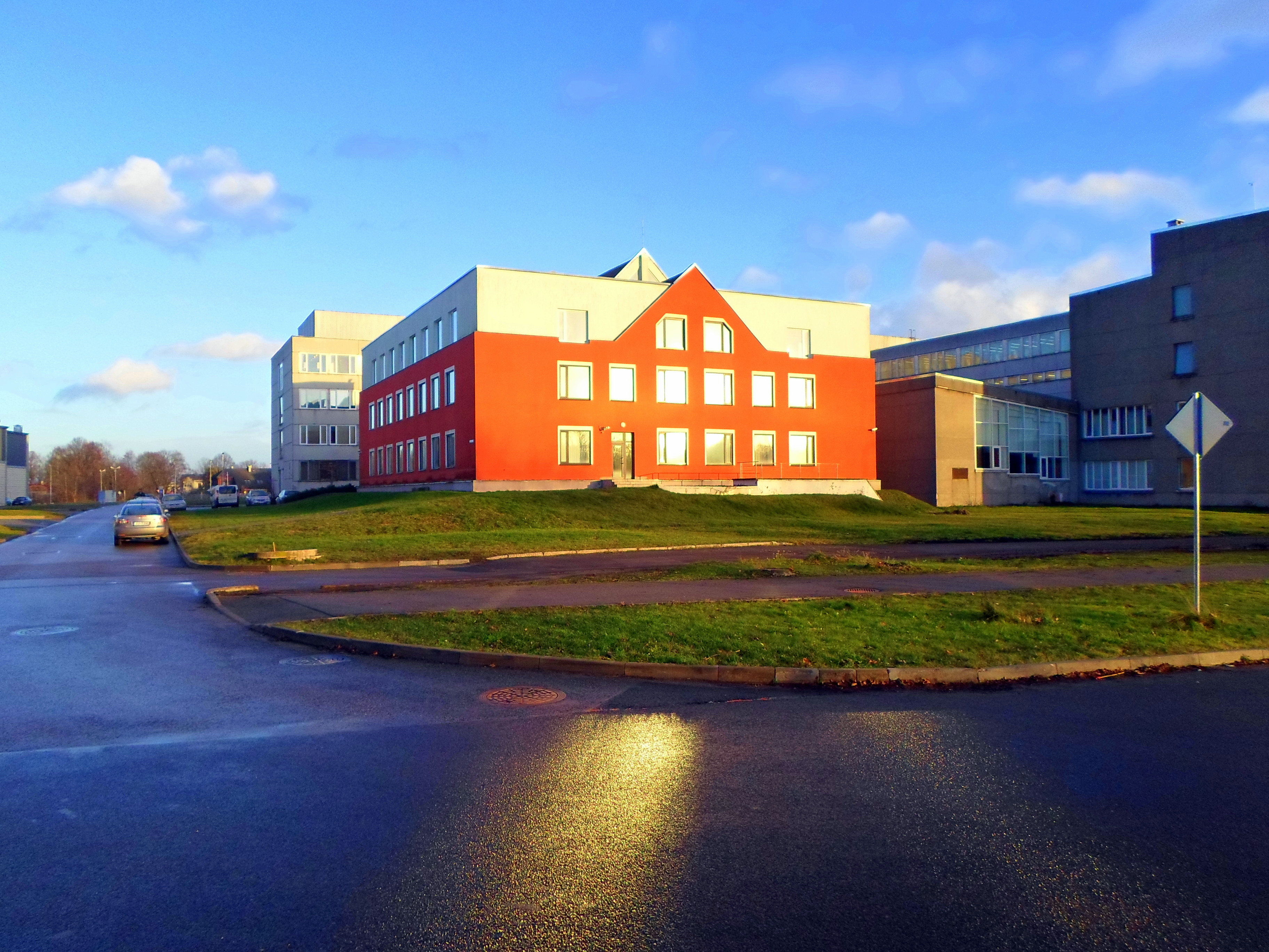 Rīgas tehniskās universitātes zinātniskā bibliotēka. Scientific library of Rīga Technical University. November, 2013